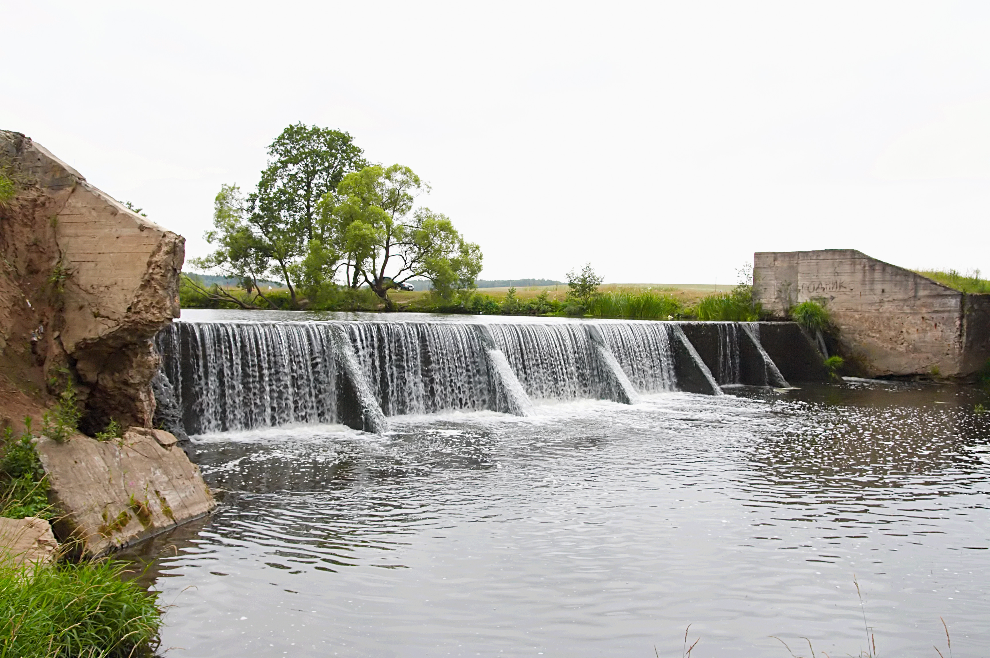 Плотина на реке Рожайка. Московская область